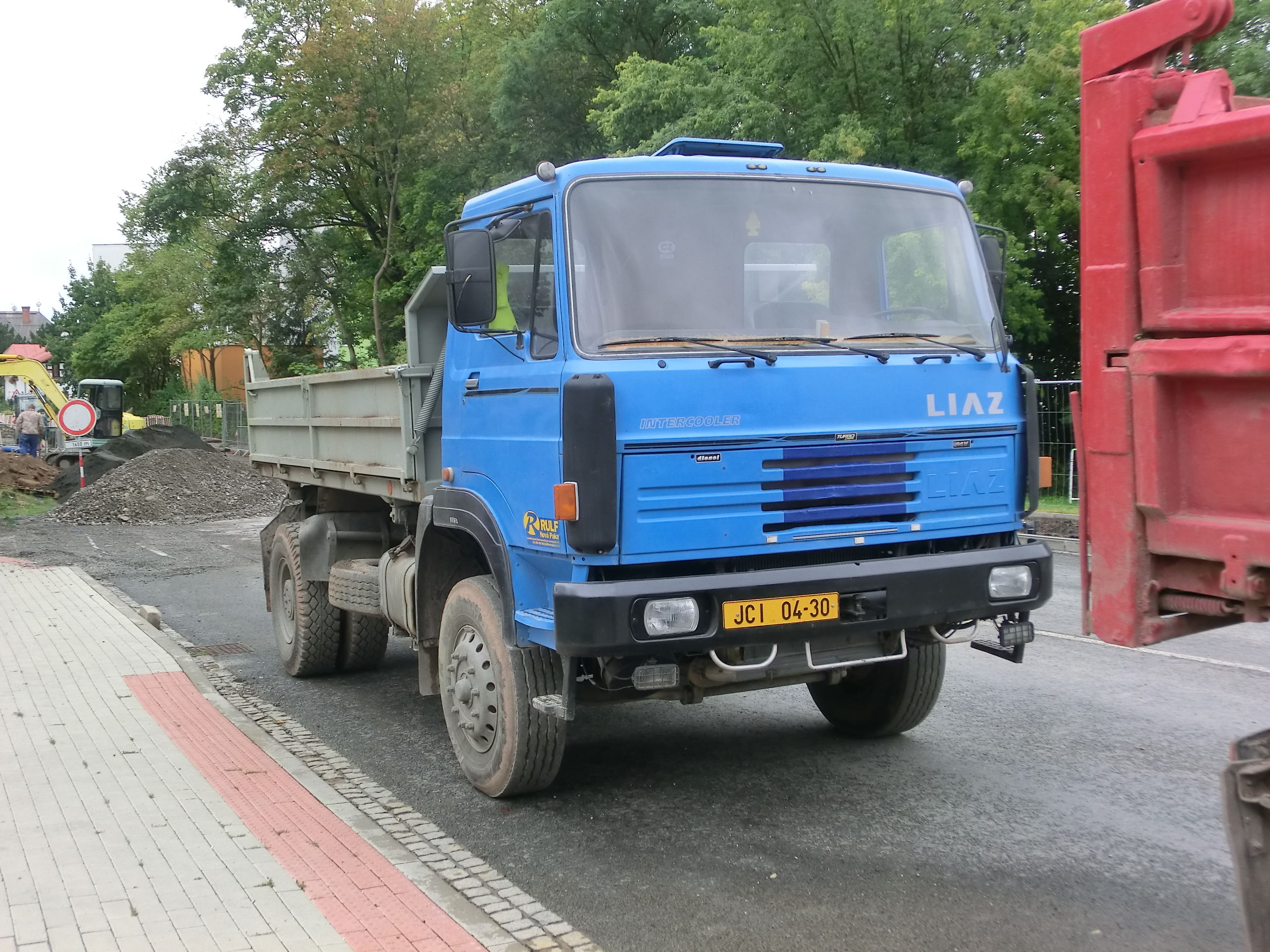 Třístranný sklápěč LIAZ 150.261. Zachyceno v přestávce při opravě Dělnické ulice ve Vrchlabí.